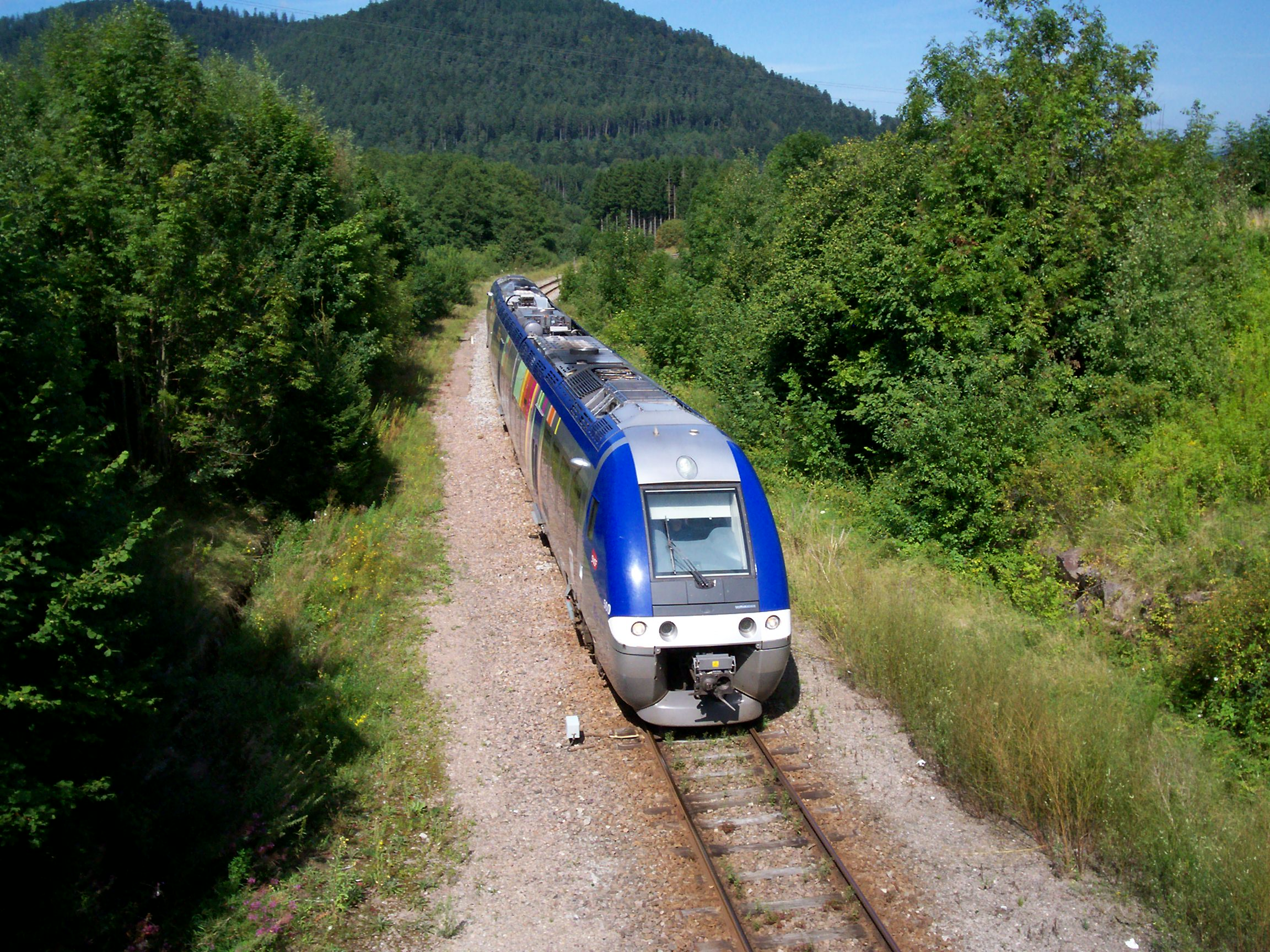 X 76500 TER Alsace